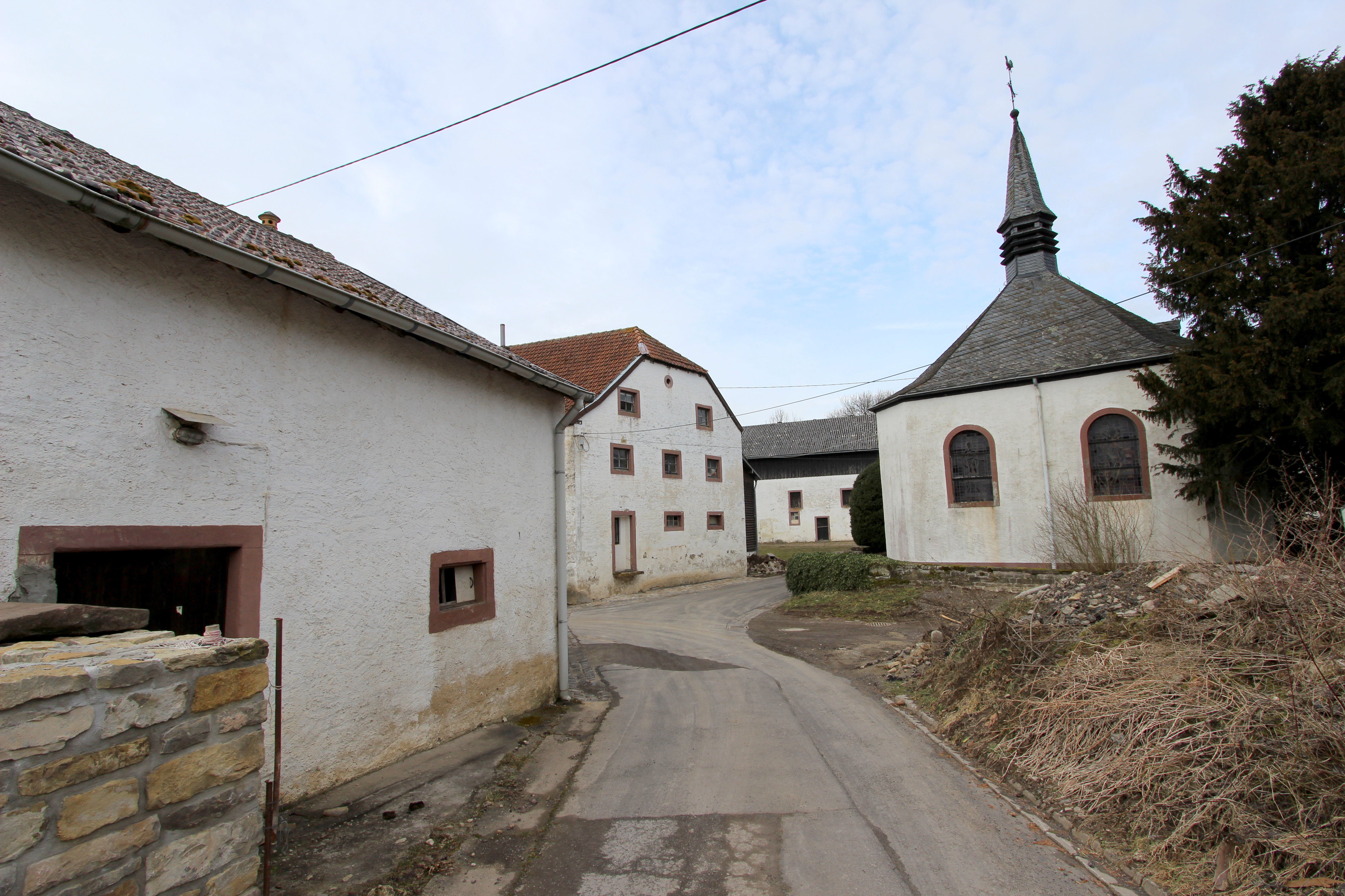 54634 Irsch. Die Gehöfte Nr. 1 und Nr. 2 bilden mit der zu Nr. 2 gehörenden Kapelle einen Weiler, der sich ab dem Beginn des 18. Jahrhunderts entwickelt hat. Diese Denkmalzone wird von keiner modernen Bebauung unterbrochen und besticht durch reizvolle Details wie Kalksteinmauern und Wieseneinfassungen aus aufrecht stehenden Kalksteinplatten. Die im Abstand einer Generation errichteten Wohnhäuser vertreten zwei Typen mittelaxialer Erschließung (Nr. 1 trauf-, Nr. 2 gieblseitig). Aufnahme von 2018.